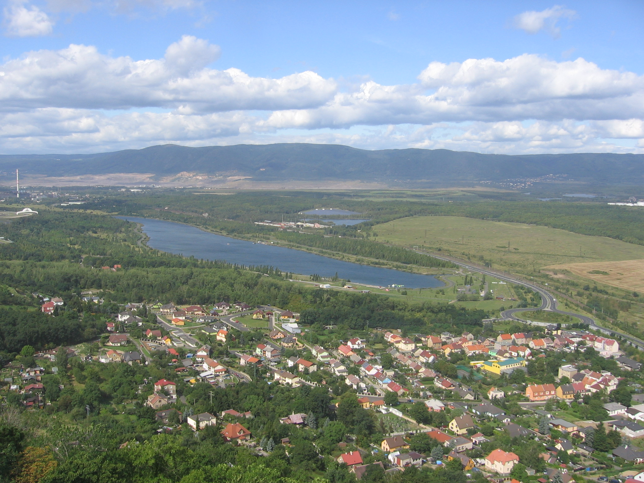 Pohled z Hněvína na Souš a na vodní nádrž Matylda.